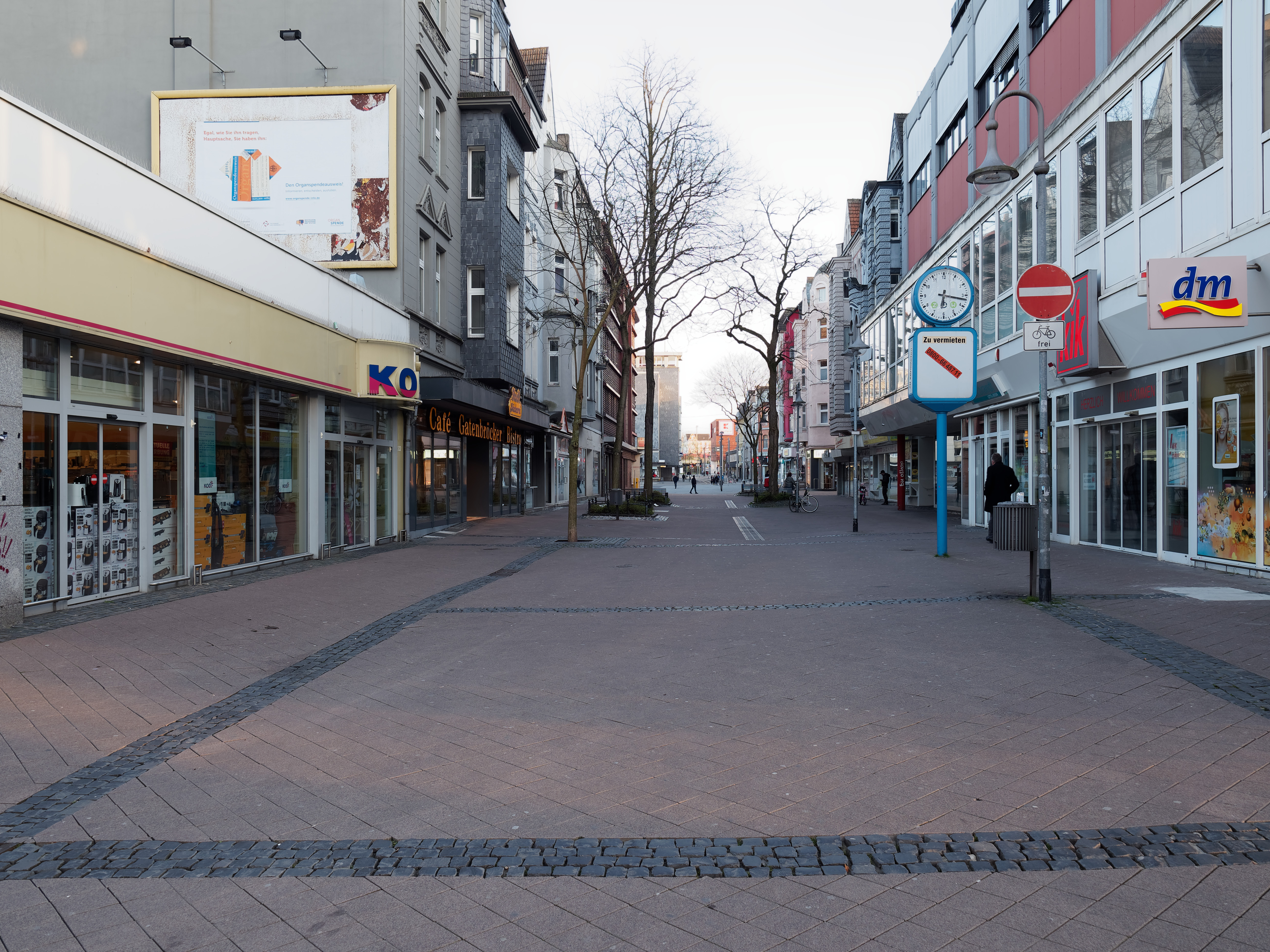 Herne-Wanne, Hauptstraße, Fußgängerzone, Einkaufsstraße in Herne, Blick in südlicher Richtung.